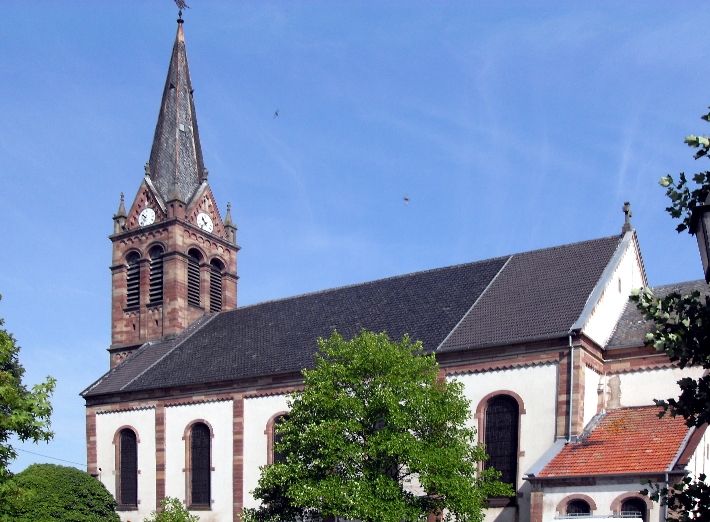 L'église Saint-Hippolyte de Flexbourg